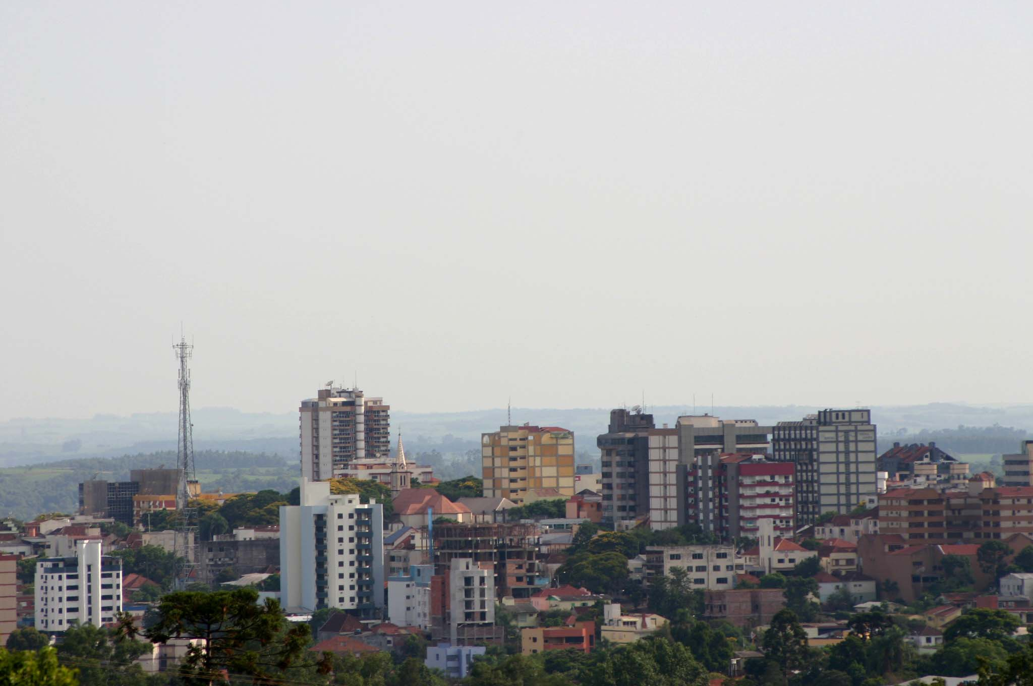 Vista parcial do município brasileiro de Ijuí, no estado do Rio Grande do Sul